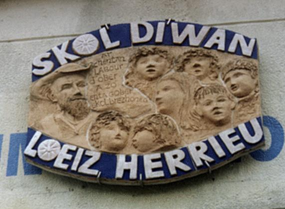 Skol Loeiz Herrieu eo Skol Diwan an Oriant.